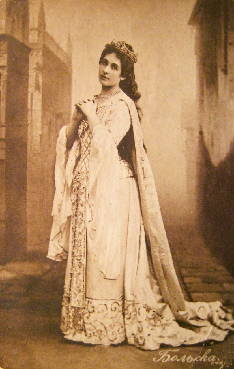 Больская, Аделаида Юлиановна (19 век)